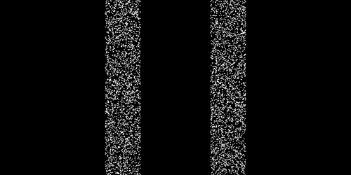 Verteilung von klassischen Teilchen hinter einem Doppelspalt (gerendert)